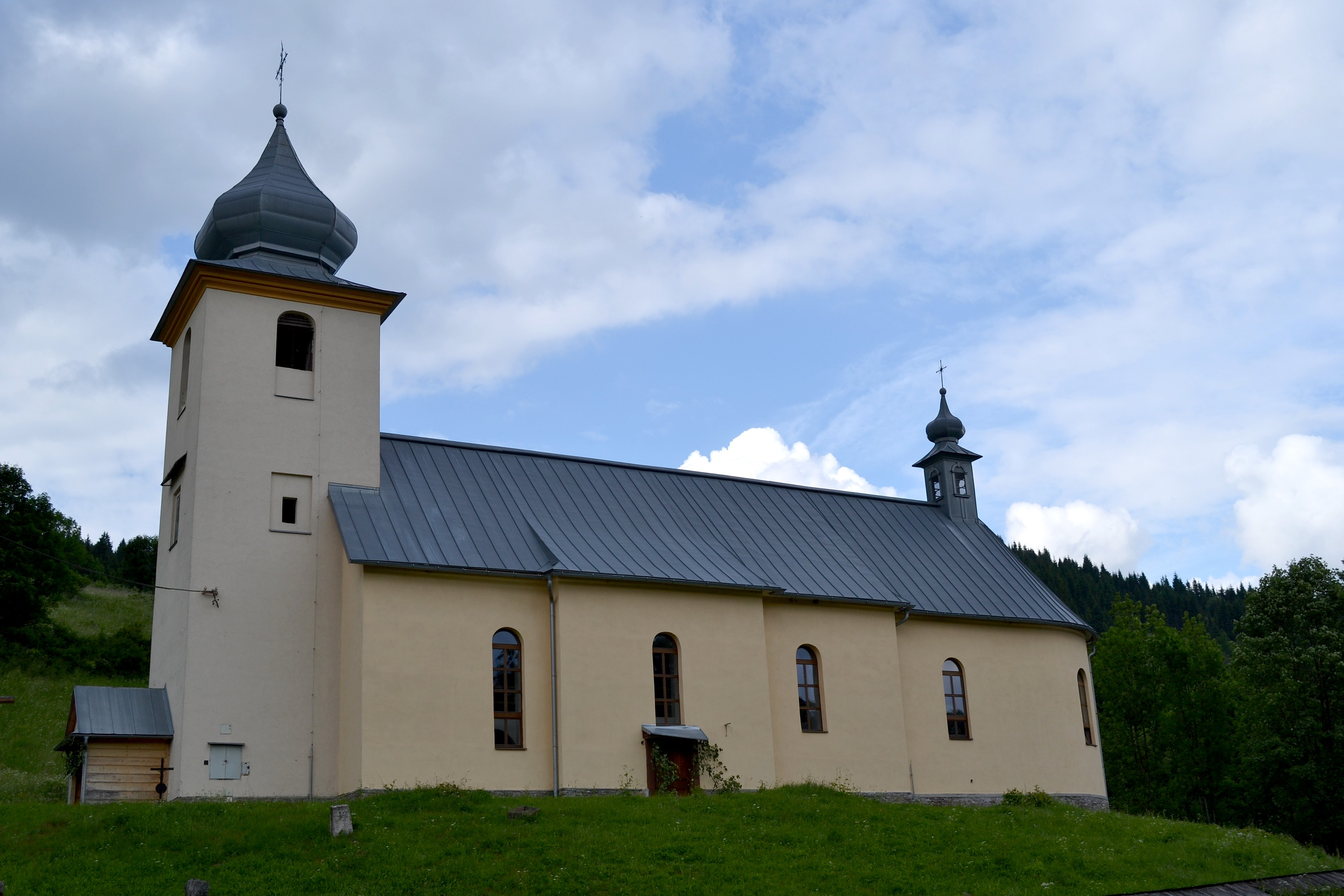 Kostol svätého Michala archanjela z roku 1796 v Osturni; celkový pohľad